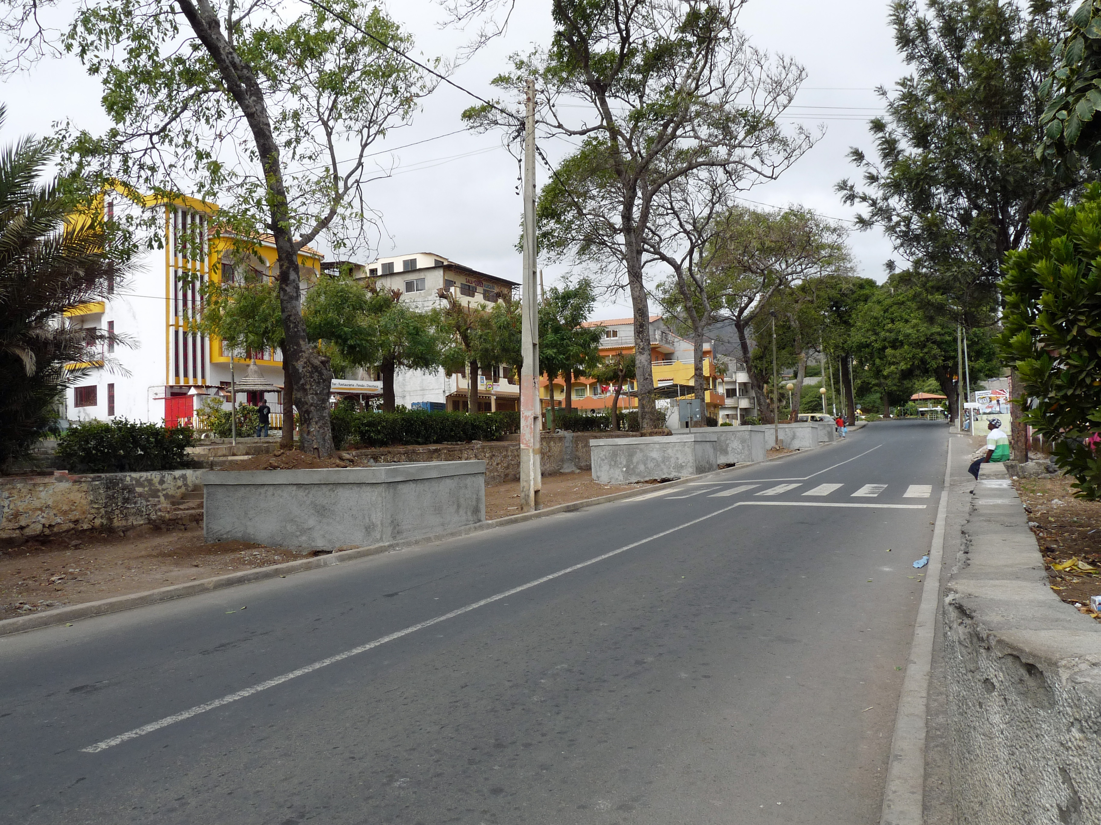 São Domingos (île de Santiago, Cap-Vert)